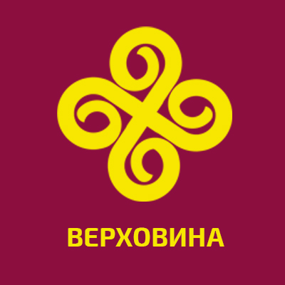 Новый логотип Гуцульской столице - Верховина